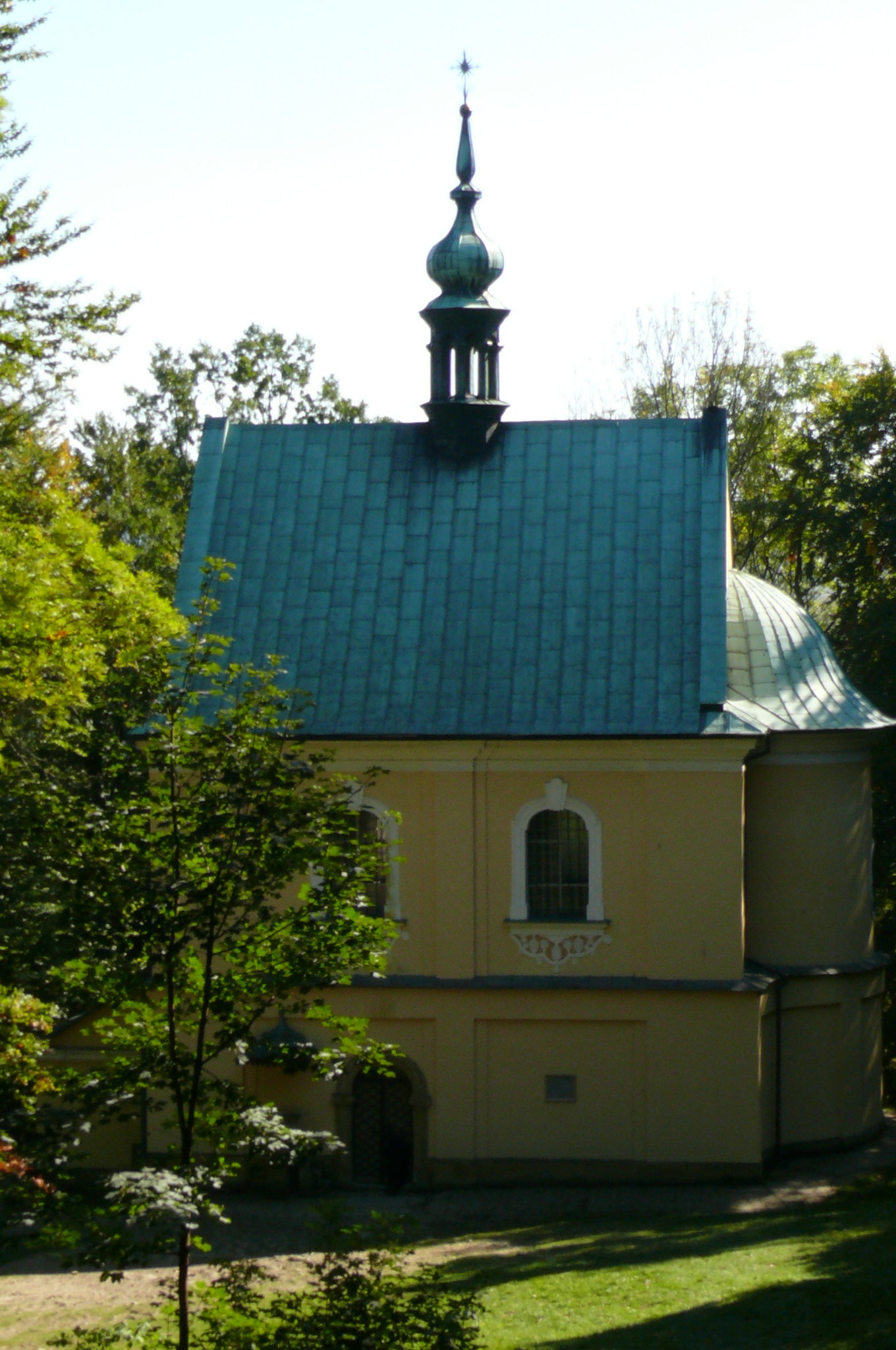 Sanktuarium pasyjno-maryjne w Kalwarii Zebrzydowskiej - Kaplica III upadku.